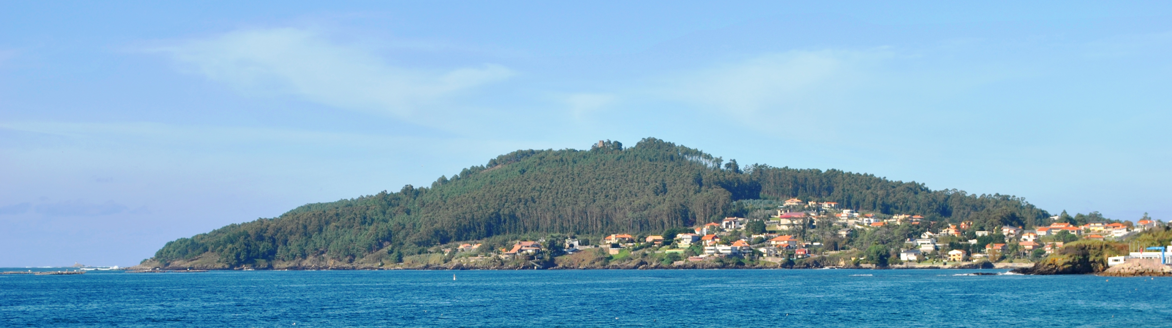 Véxase o título e as categorías.